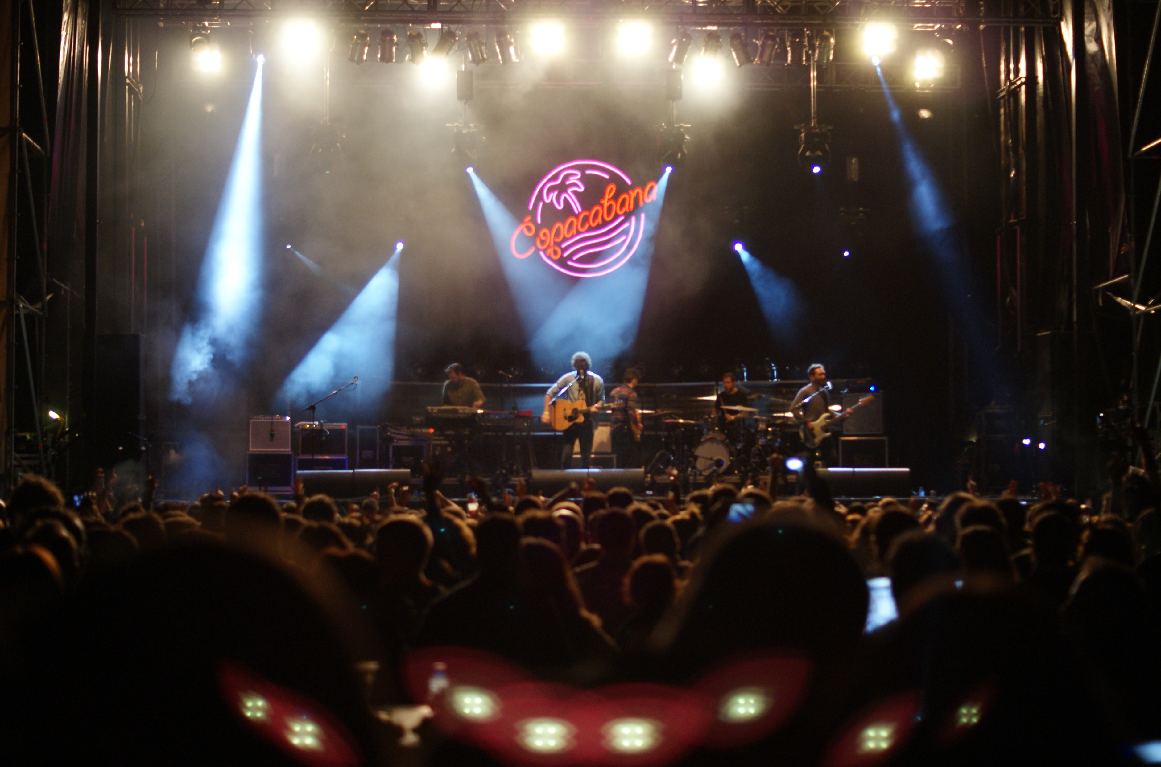 Izal en el festival Palencia Sonora 2016.